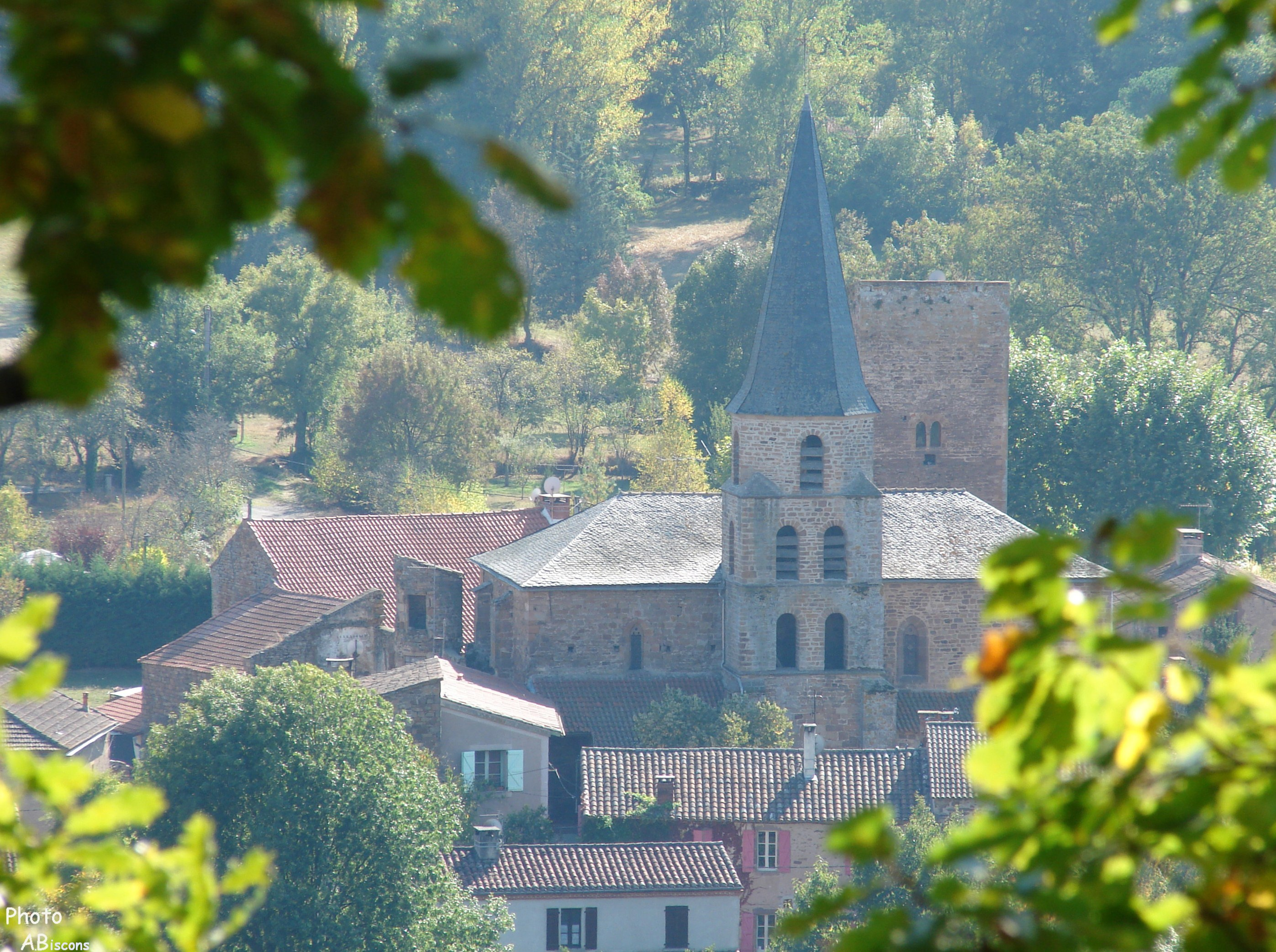 église du village tour-donjon